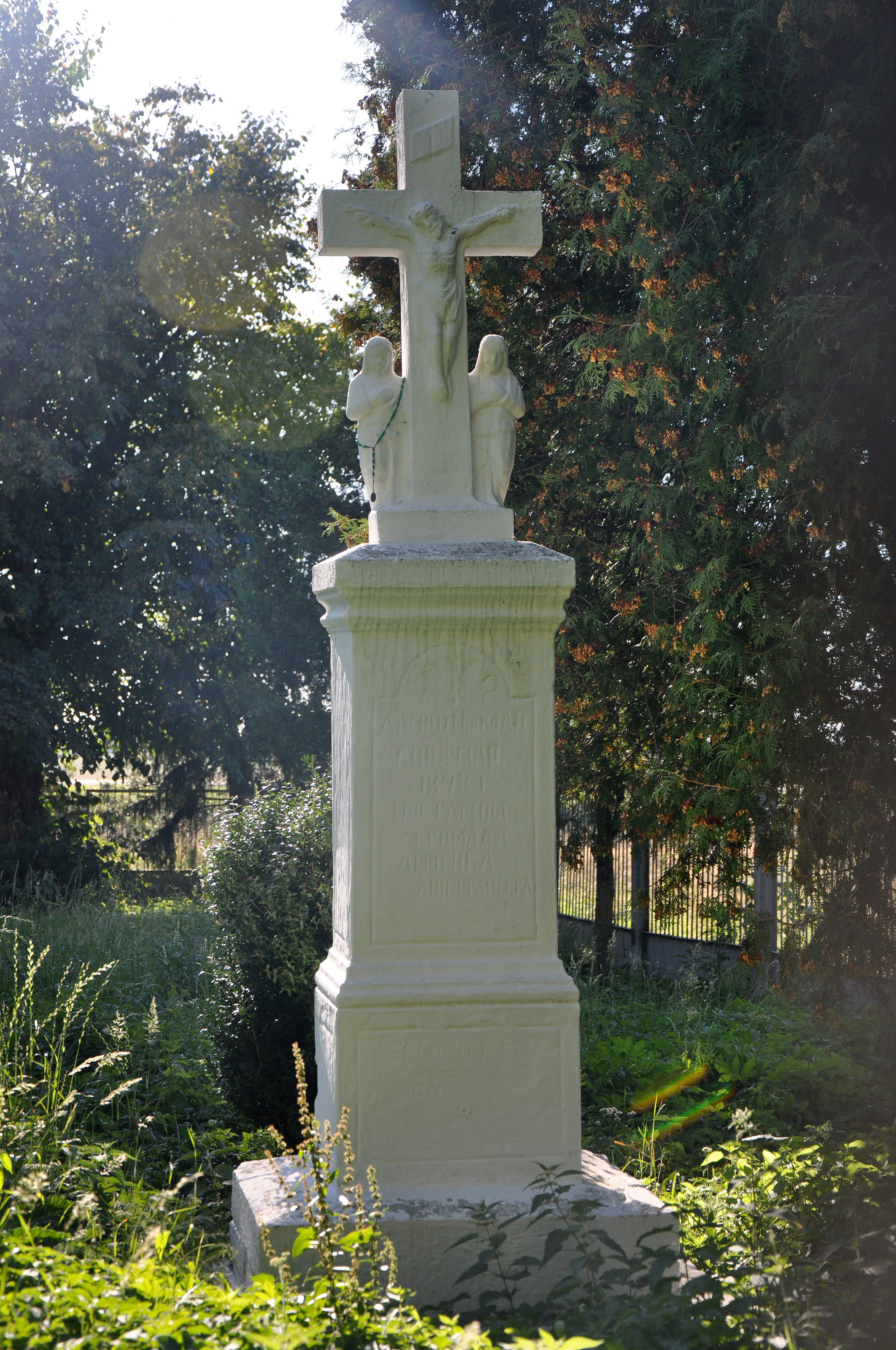 Пам'ятник на честь скасування панщини (1848, пісковик), с.Дем’янка Наддністрянська, біля церкви